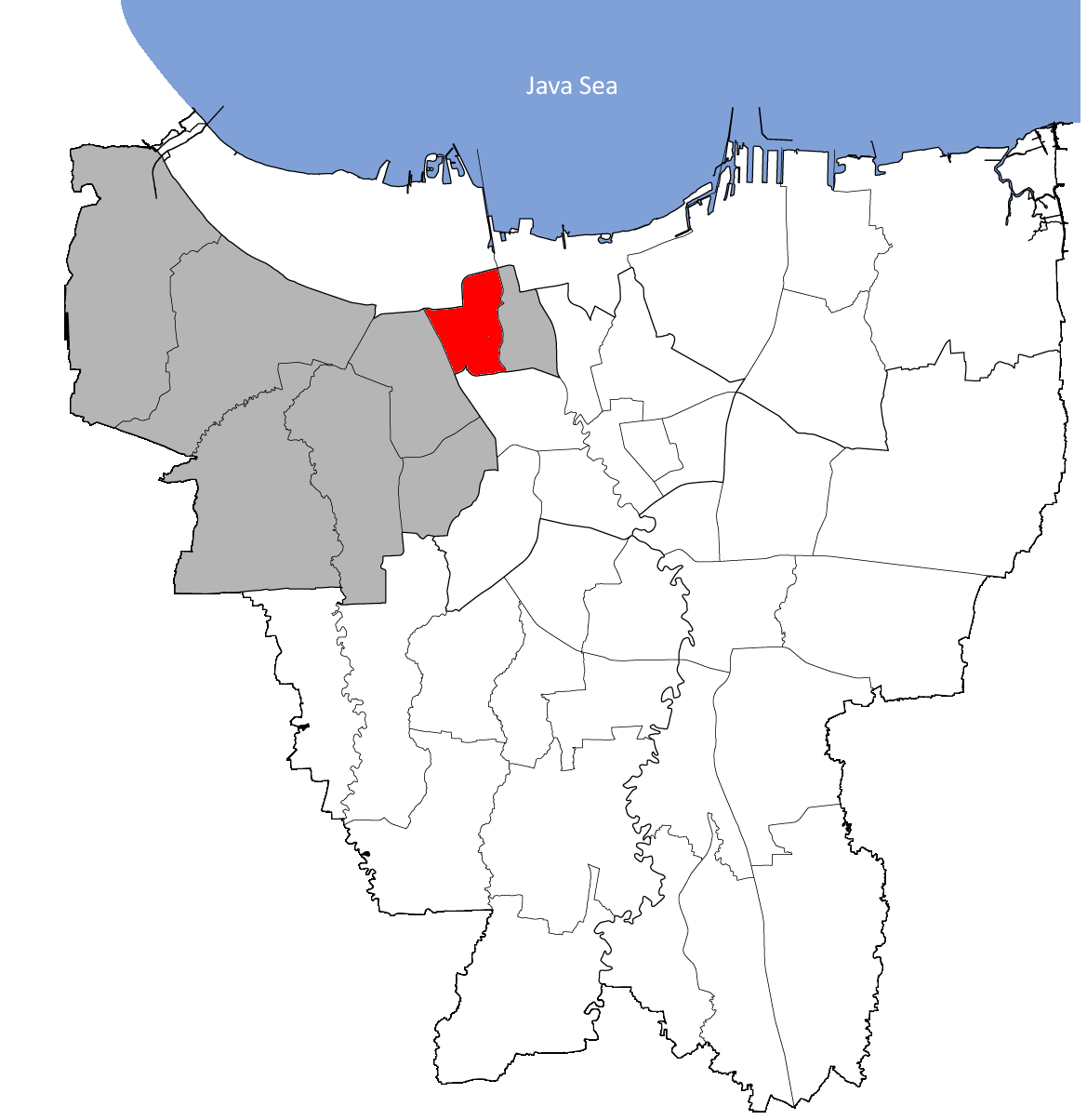 Tambora;onderdistrict (Kecamatan) van West-Jakarta